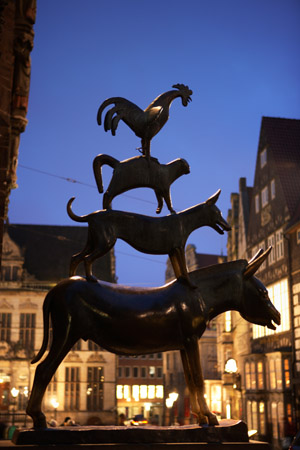 Die Bremer Stadtmusikanten bei Nacht.